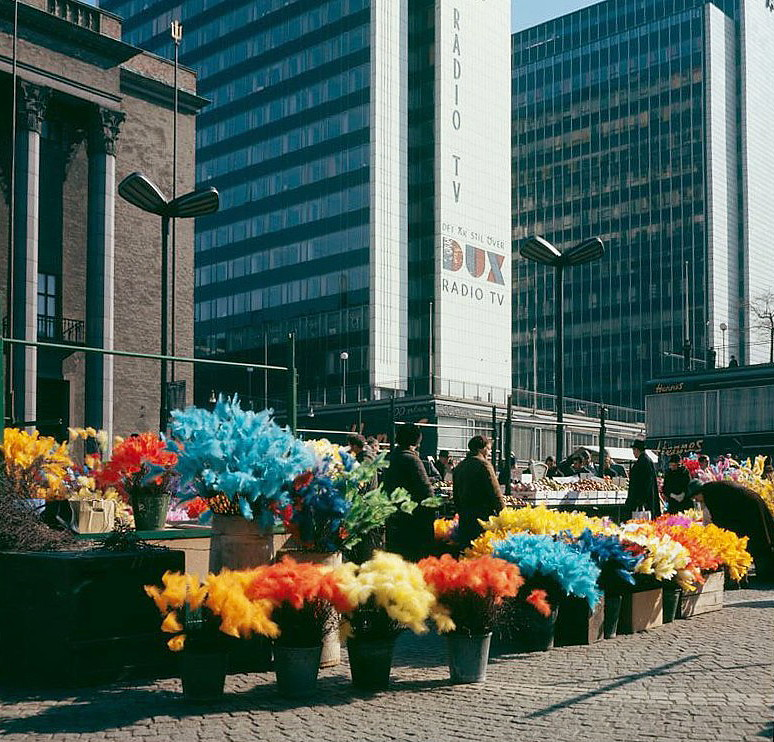 Påskrisförsäljning på Hötorget framför Konserthuset. Vy mot första och andra hötorgshuset med reklam för DUX Radio och TV på det första husets gavel